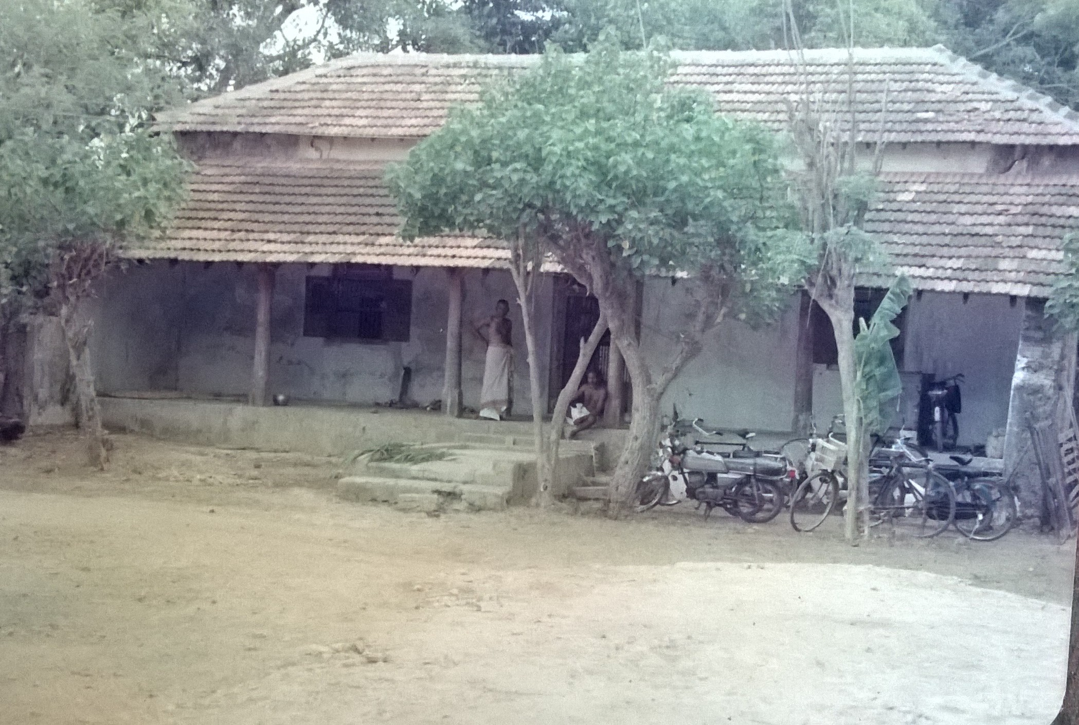 அறநெறி பாடசாலை ஆரம்ப கால தோற்றம்